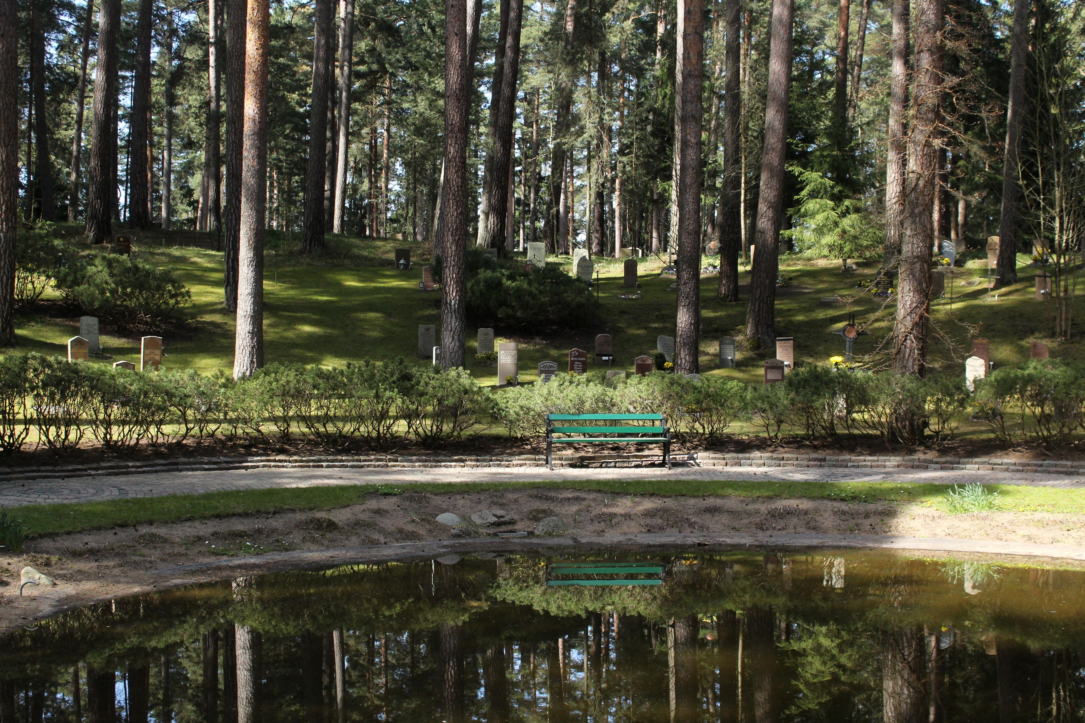 Skogskyrkogården, Jönköping